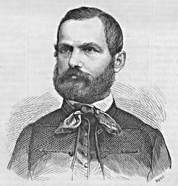 Kerkápoly Károly (1824–1891) politikus, miniszter. Rusz Károly metszete (Vasárnapi Ujság, 1869. január 24. )